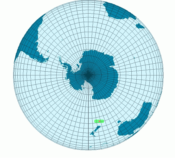 Carte représentant les zone de reproduction et d'habitation du manchot Gorfou des Snares. En vert, les zones où le Gorfou des Snares vie. En rouge, les zones de reproduction. Créer Par BRUCHET Sébastien et sous license GFDL. (Utilisation de File:MapS.png pour la création)